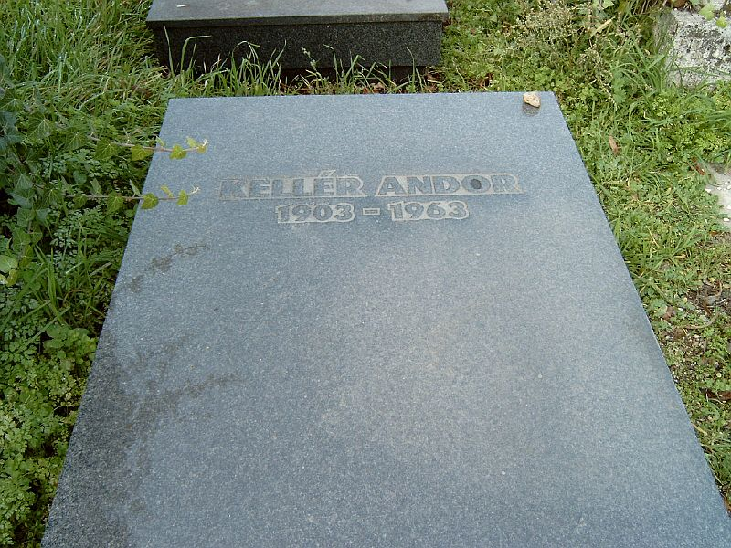 Kellér Andor (Budapest, 1903. május 5. – Budapest, 1963. augusztus 20.) író, újságíró sírja Budapesten. Kozma utcai izraelita temető: 5B-8-10